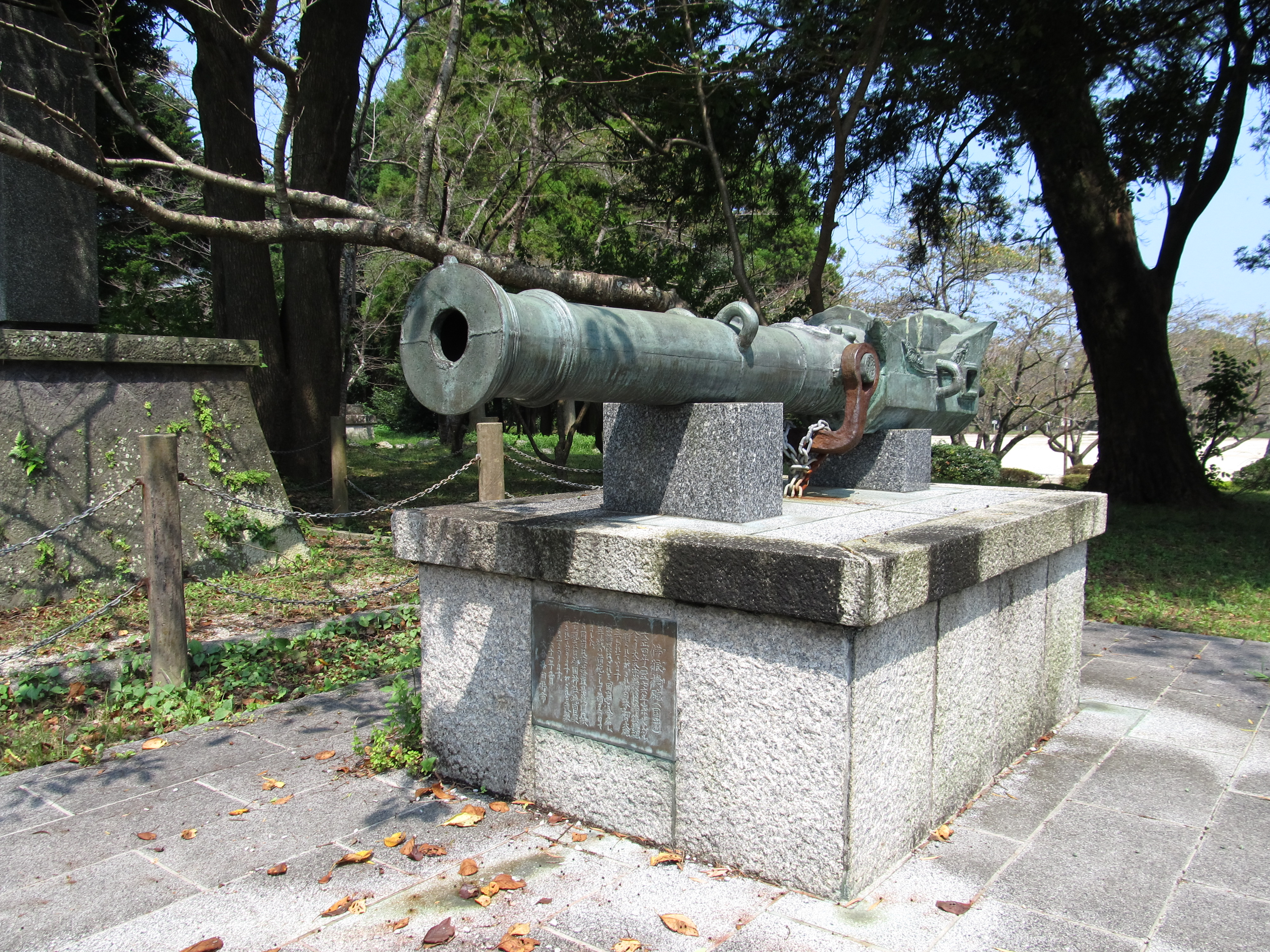 大分県臼杵市の臼杵公園（臼杵城跡）にある佛狼機（フランキ）砲「国崩」のレプリカ。